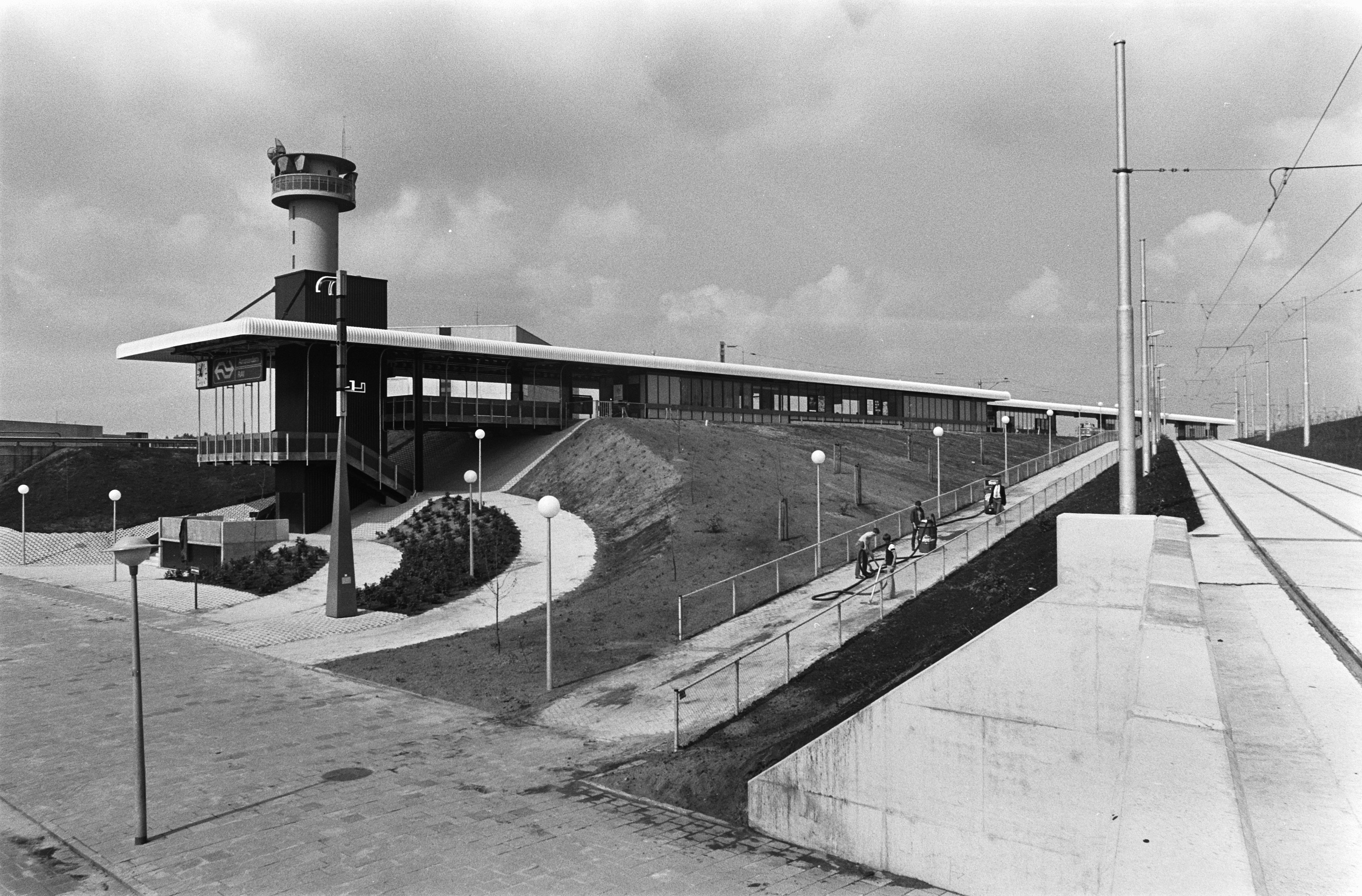 Collectie / Archief : Fotocollectie Anefo Reportage / Serie : [ onbekend ] Beschrijving : Schiphollijn wordt 1 juni a.s. geopend; station Amsterdam RAI met rechts de tramrails die uitkomt bij de eindhalte naast het station; tevens te zien kunstwerk De tijd in drie dimensies van Ingendahl voor het station en brug 800 op de voorgrond. Datum : 29 mei 1981 Locatie : Amsterdam, Noord-Holland Trefwoorden : stations, tramrails Instellingsnaam : RAI Fotograaf : Smirren, […] van / Anefo Auteursrechthebbende : Nationaal Archief Materiaalsoort : Negatief (zwart/wit) Nummer archiefinventaris : bekijk toegang 2.24.01.05 Bestanddeelnummer : 931-5154